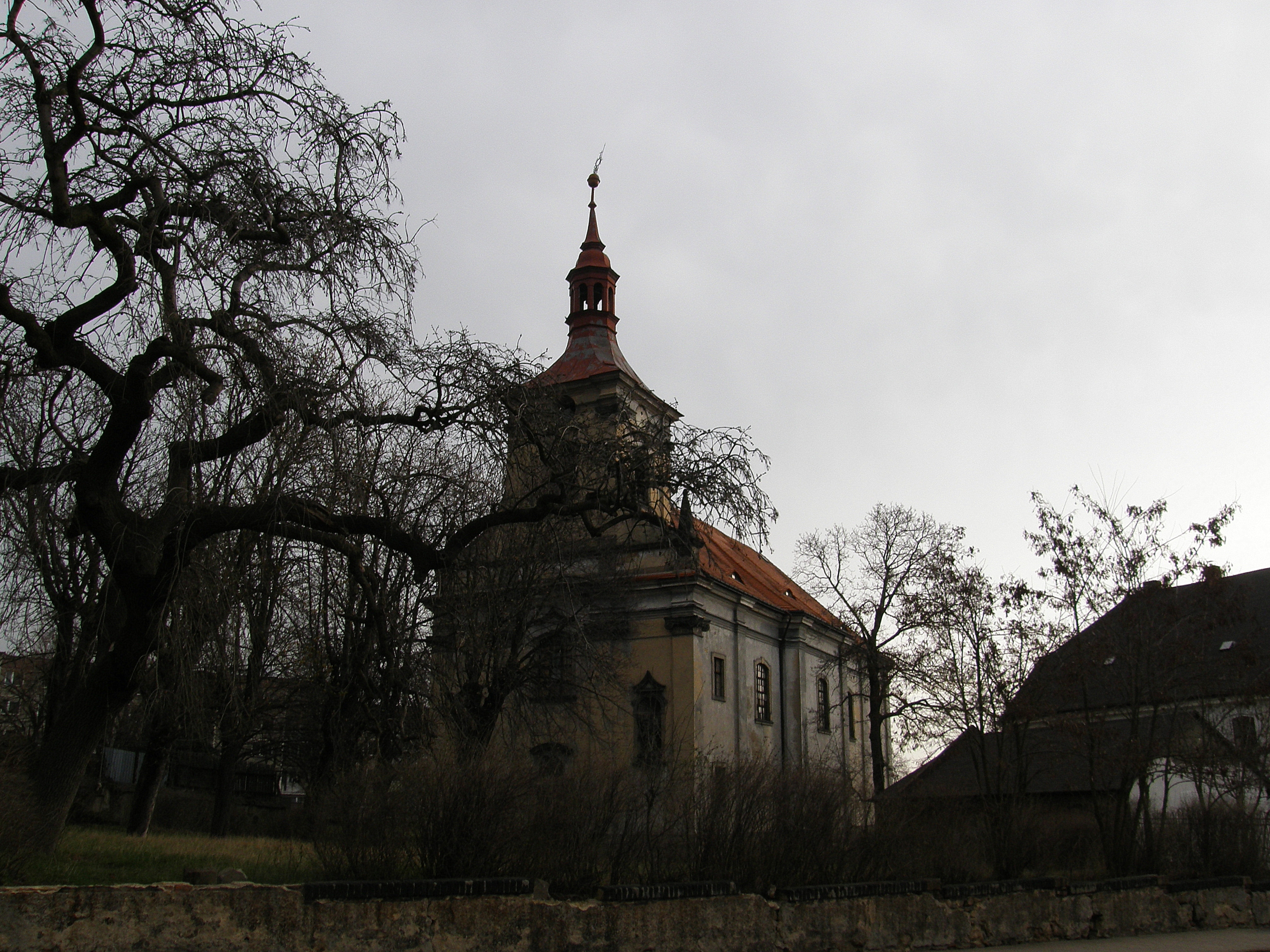 Kostel sv. Petra Pavla , dílo O. Broggia, vystavěn v letech 1712-1714